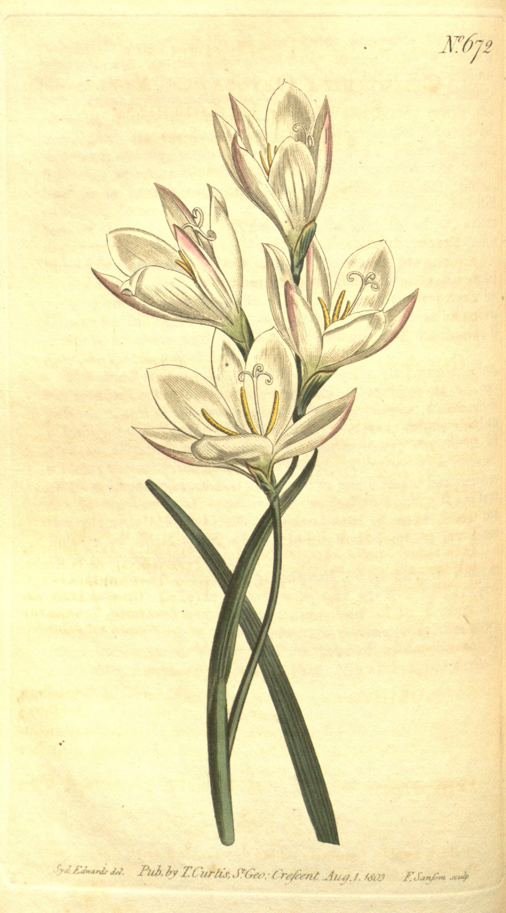 x:Oj-j